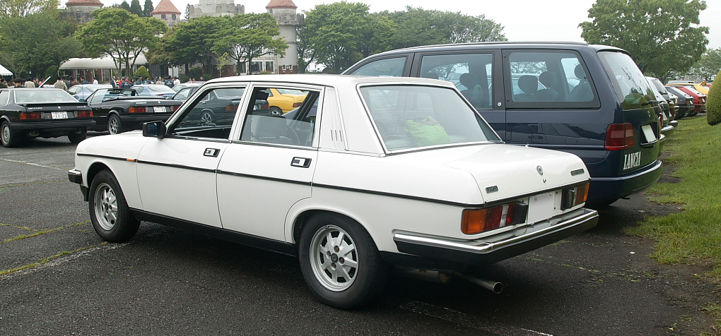 Lancia Trevi VX ( rear )